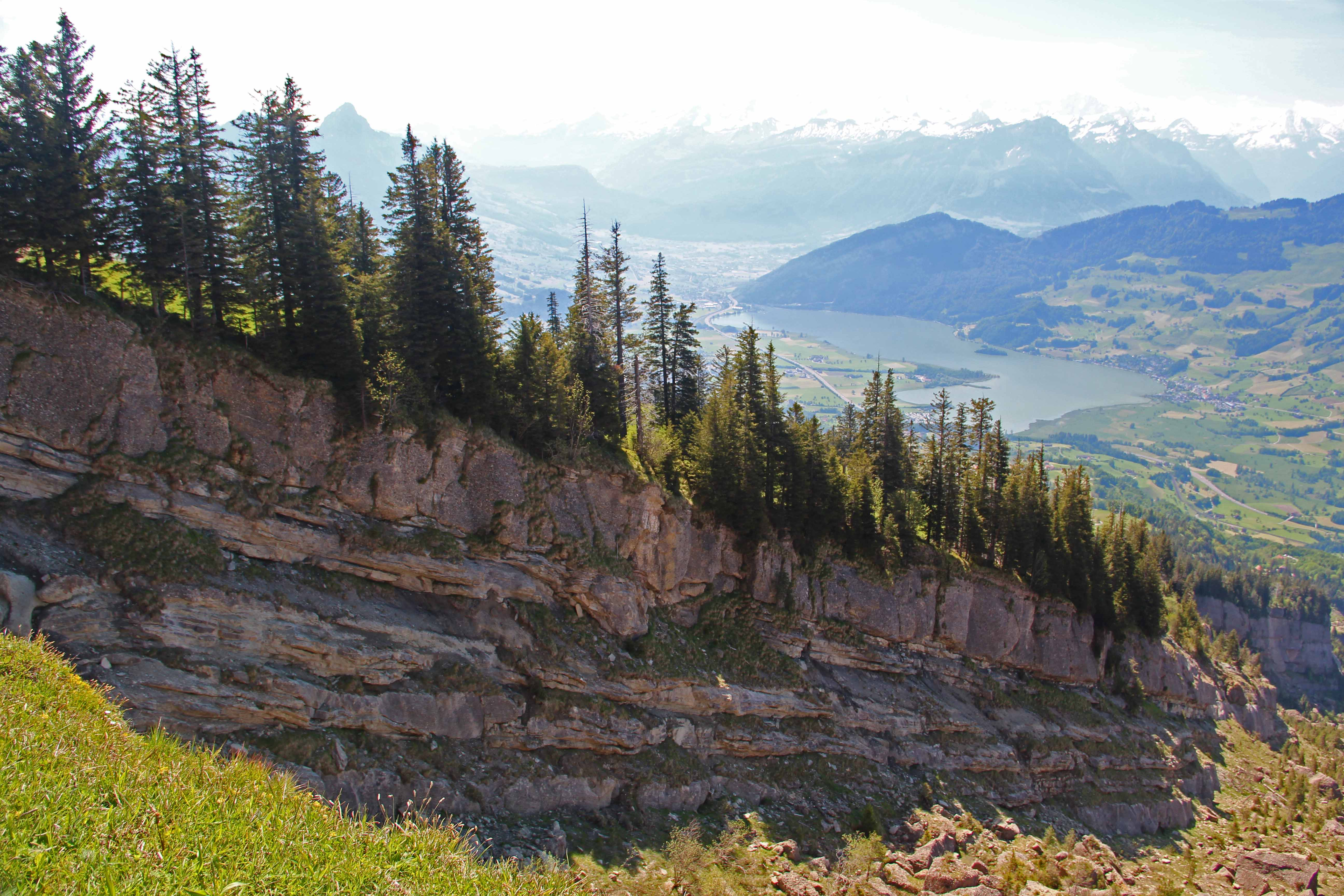 Aufschluss der Gesteinsschichten an der Abbruchkante des Goldauer Bergsturzes, vom oberen Ende der Scharte (Gnipen-Gipfel) gesehen